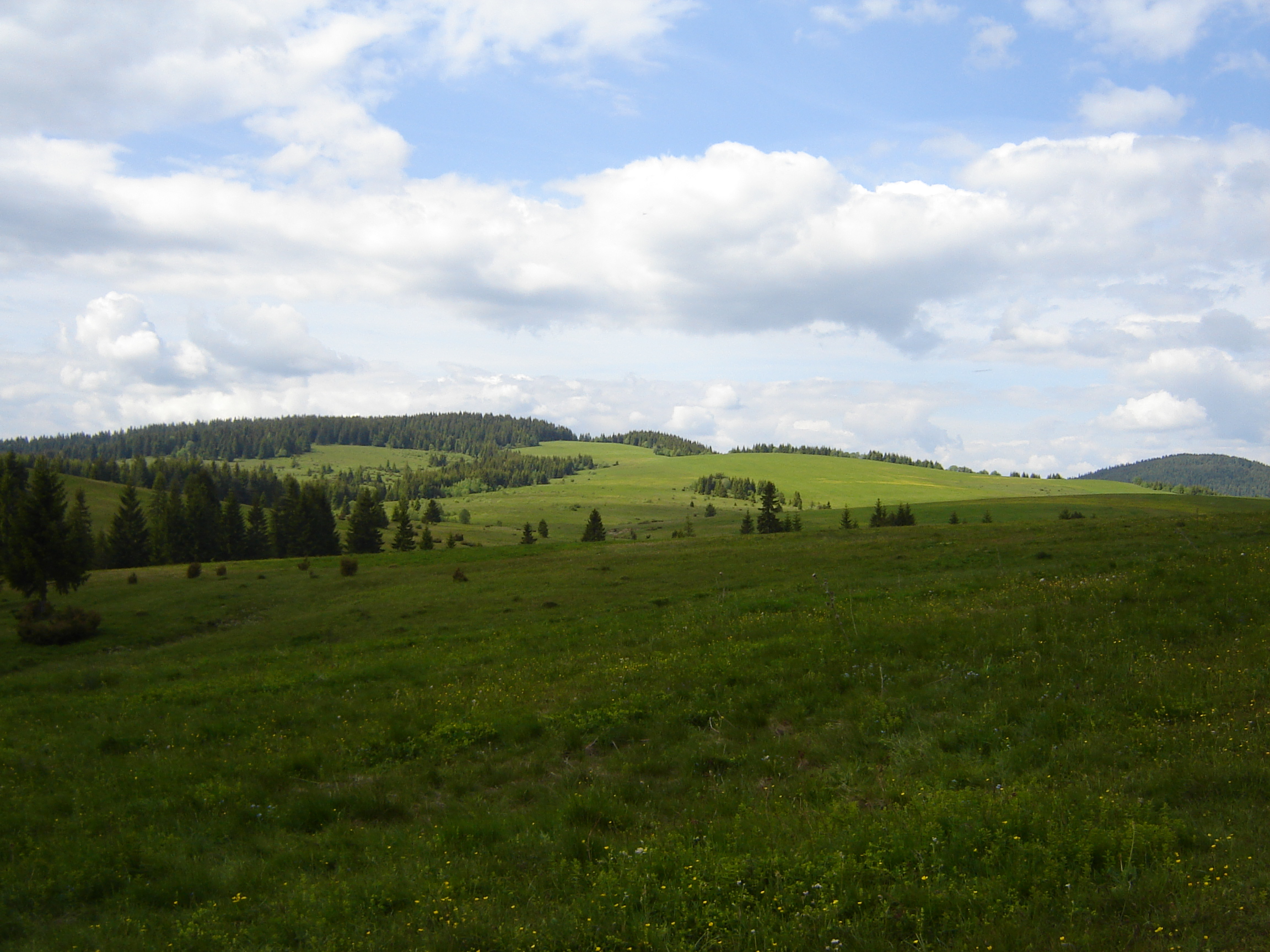 Lúky Svoradu